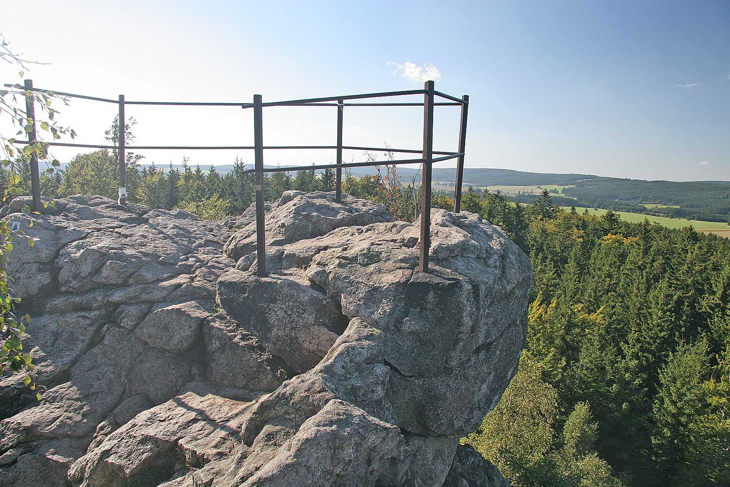 Skalní útvar Pasecká skála, Žďárské vrchy, district Žďár nad Sázavou, Czech Republic autor: Prazak date: 6. 9. 2006